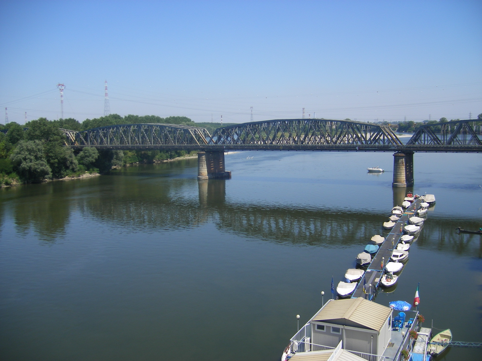 Piacenza - Po River